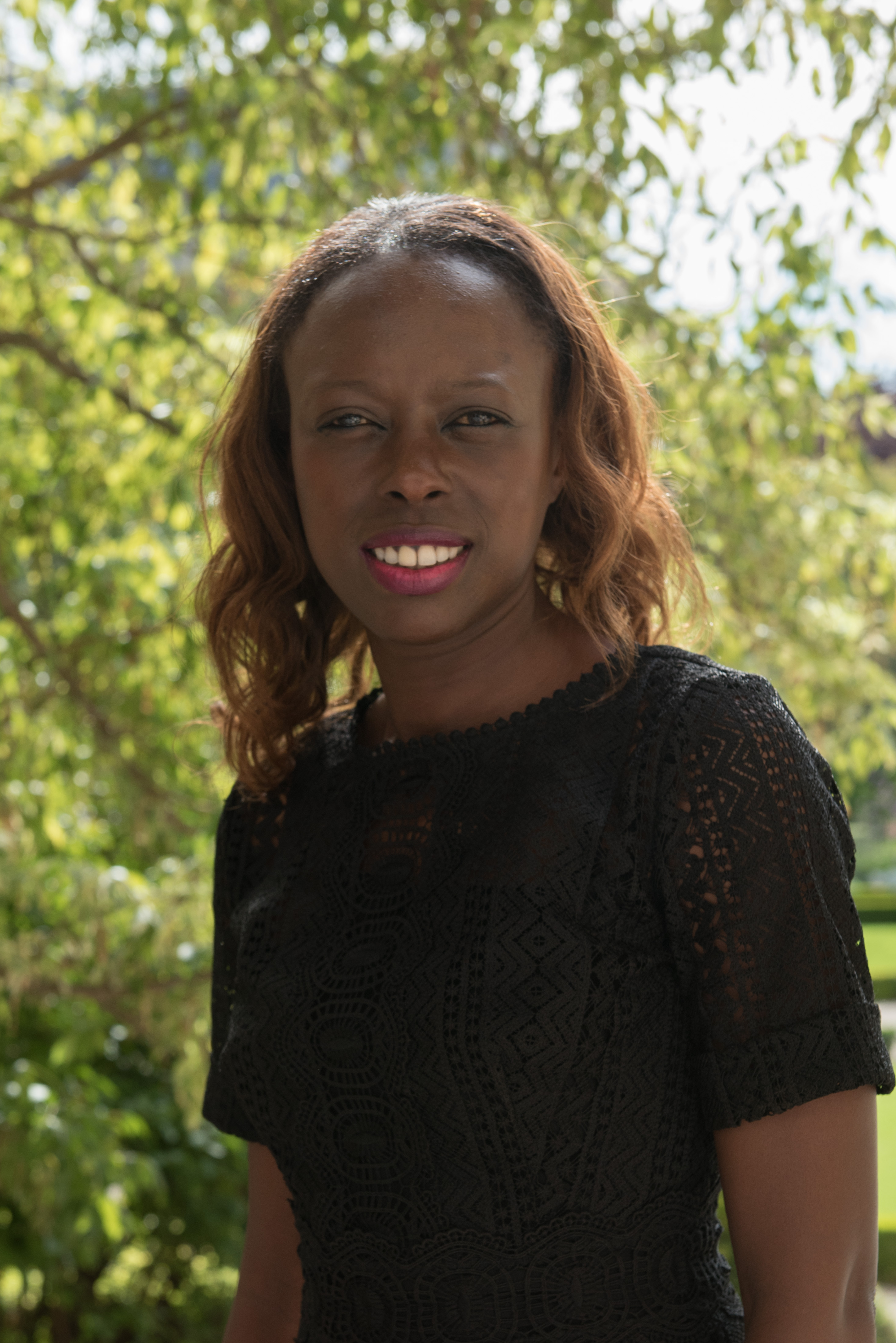 Sira Sylla dans le jardin des Quatre colonnes du palais Bourbon en 2017.